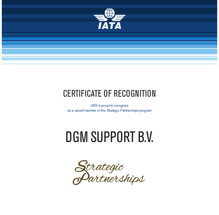 Certificado otorgado por IATA a DGM